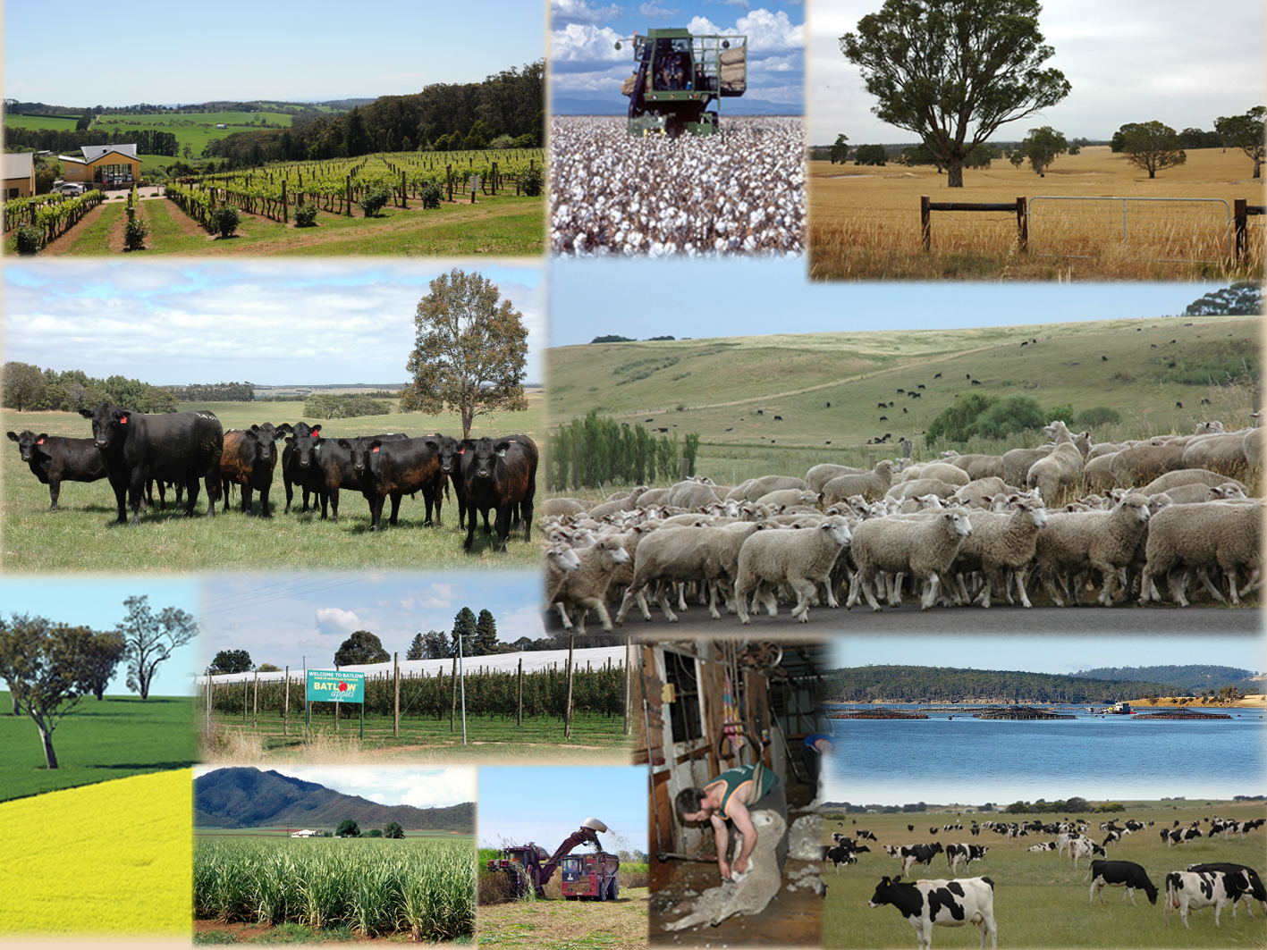 Composition réalisée à partir de 12 photos représentant les différentes productions agricoles d'Australie